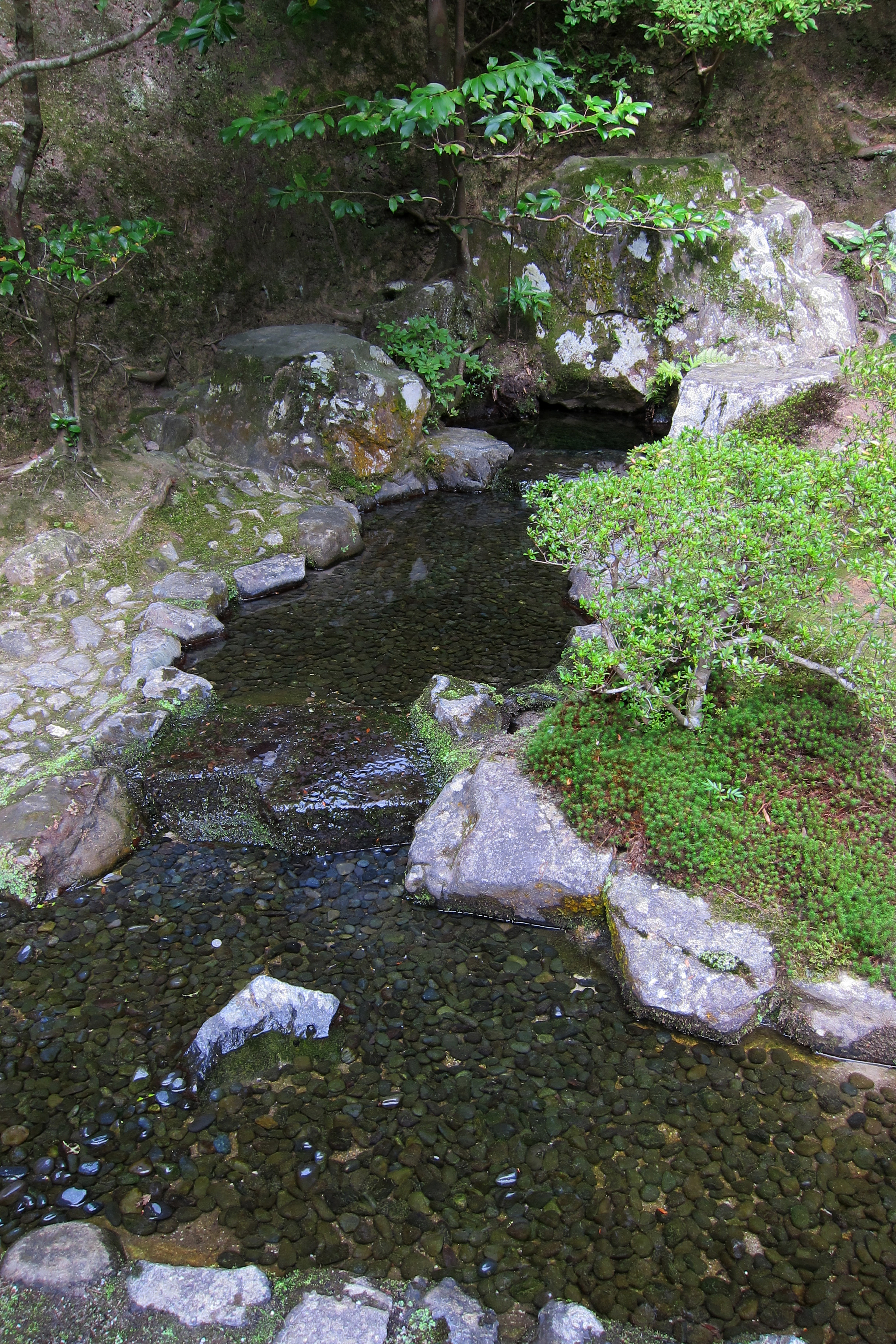 Ginkakuji (銀閣寺), Kyoto, Kyoto prefecture, Japan